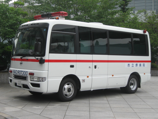 市立堺病院ドクターカー